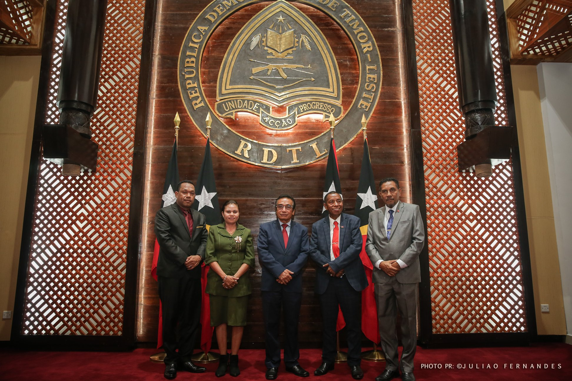 Vertreter der KHUNTO bei Staatspräsident Francisco Guterres im Palácio Presidente Nicolau Lobato